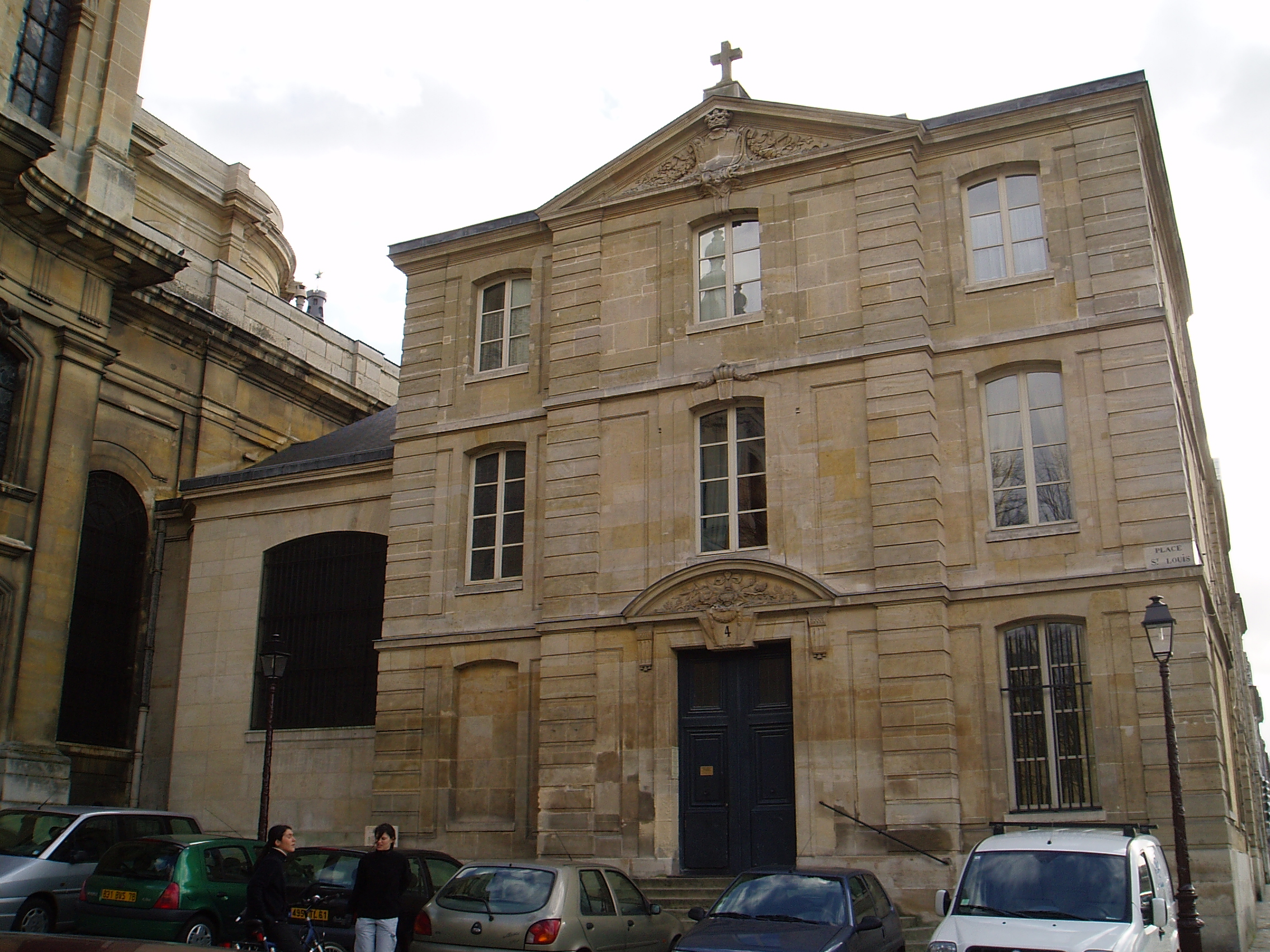 Maison des lazaristes : Presbytère de la cathédrale Cathédrale Saint-Louis de Versailles Architecte : Jules Hardouin Mansart de Sagonne Construction : 12 juin 1743 Inauguration : 24 août 1754 consacrée cathédrale en 1843